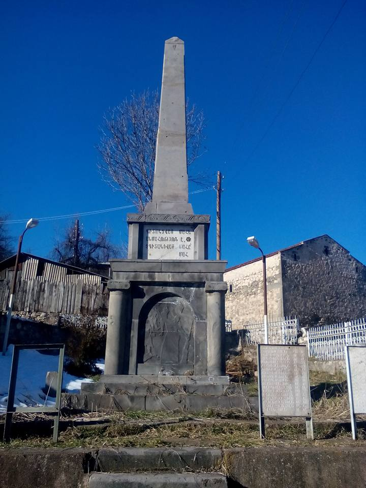 Հայրենական պատերազմի մասնակիցներին նվիրված հուշարձանը գյուղի կենտրոնում